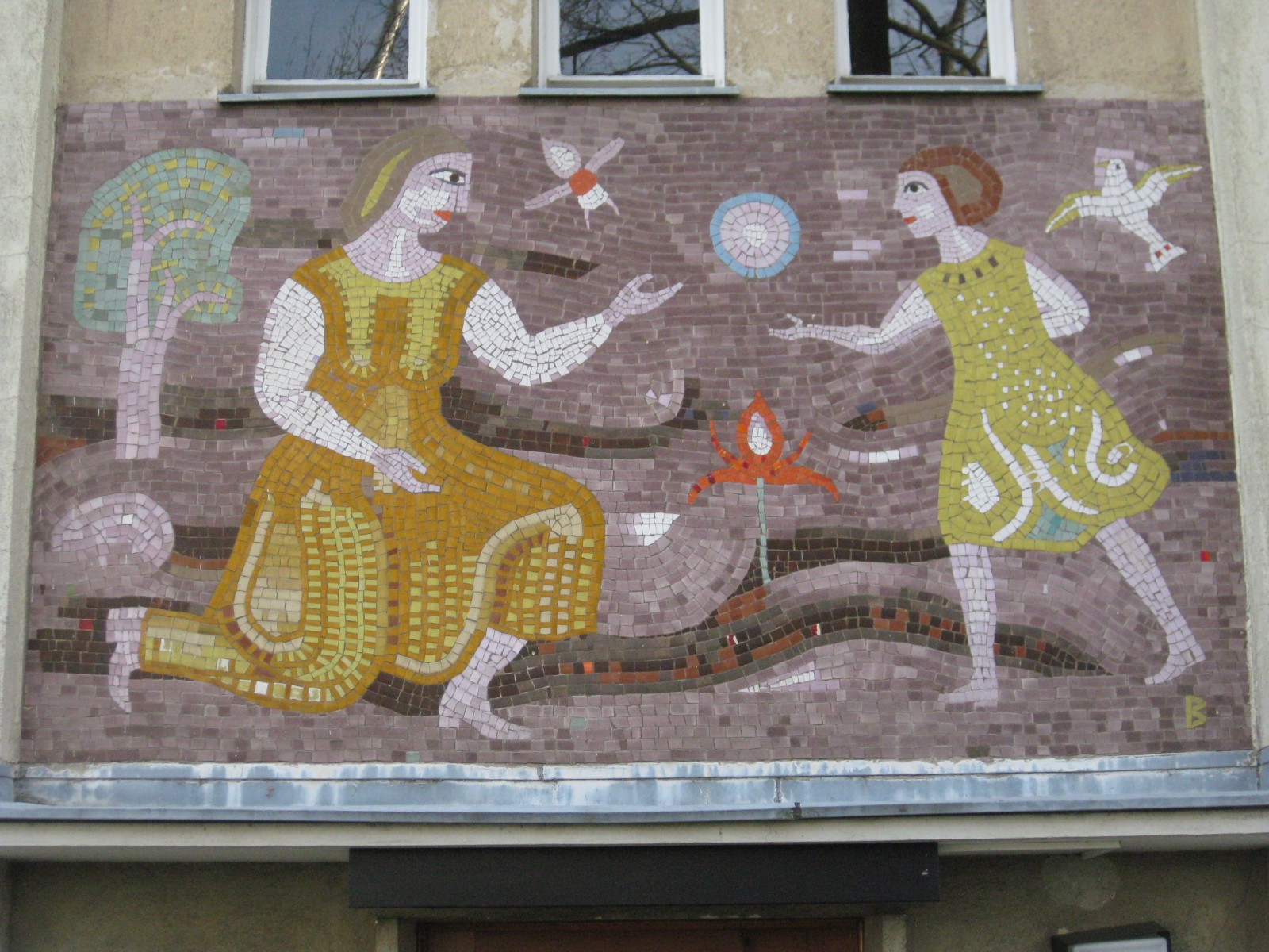 Mosaik-Supraporte Familie von Arik Brauer, 1960, Wagramer Straße 164-168 Stiege 7, Wien Donaustadt. This media shows the Vienna residential building (Gemeindebau) with the ID 1557.